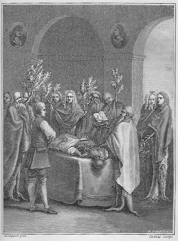 Illustration af Abildgaard (stukket af Clemens) til Niels Klim 1789